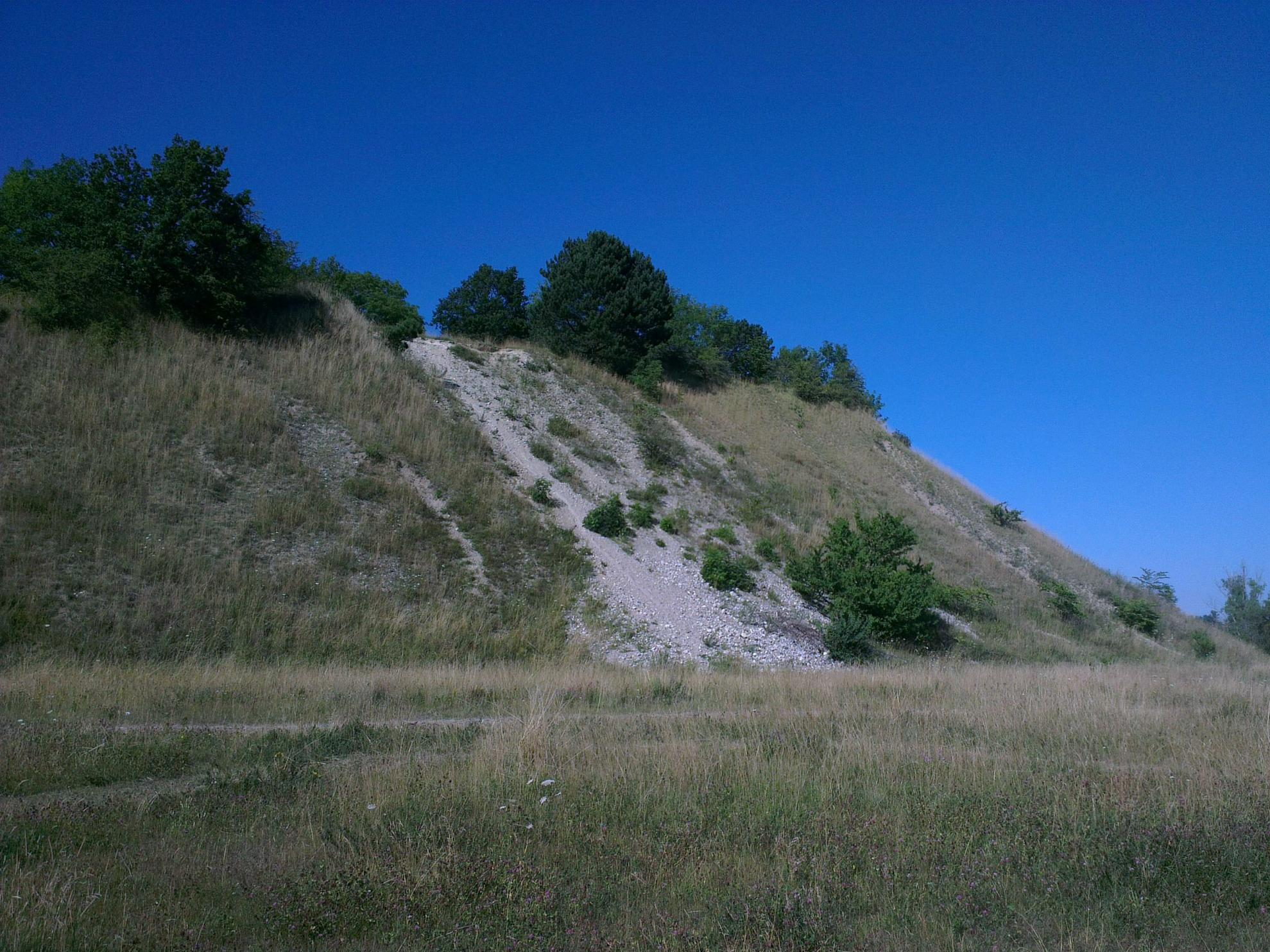 Skuldelev Ås i Horns Herred